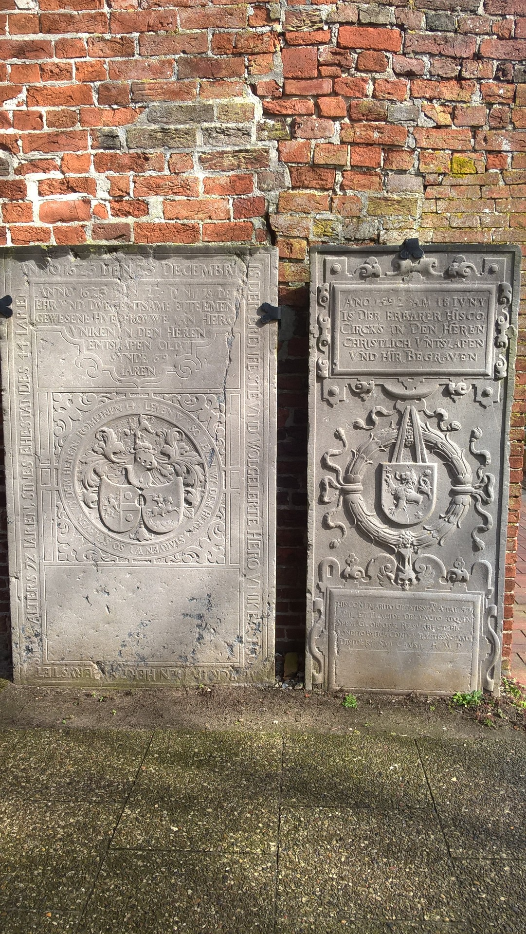 Evangelisch-reformierte Kirche Mitling-Mark, Gemeinde Westoverledingen, Landkreis Leer, Ostfriesland, Niedersachsen, Deutschland